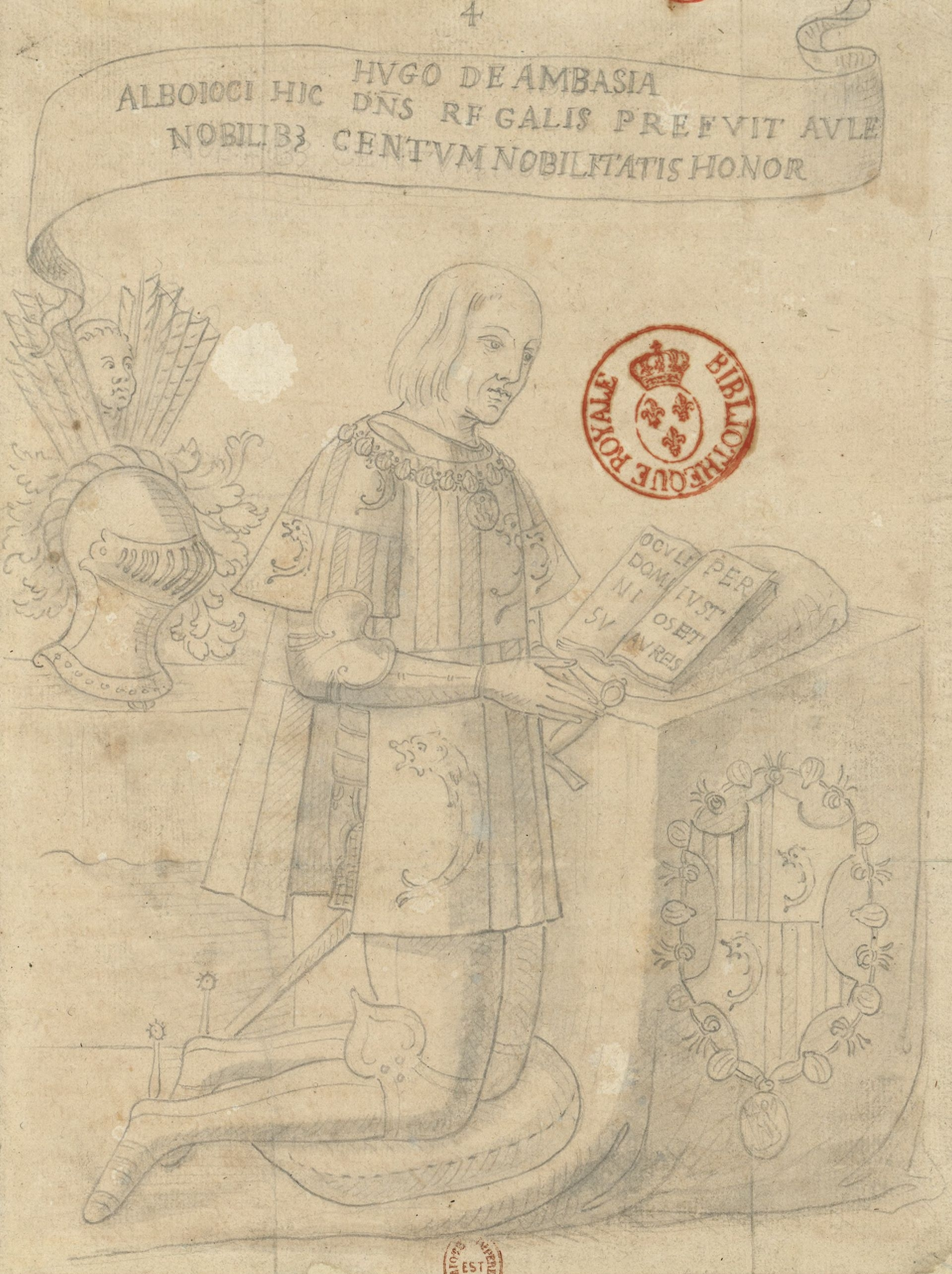 dessin d'un vitrail représentant Hugues d'Amboise.